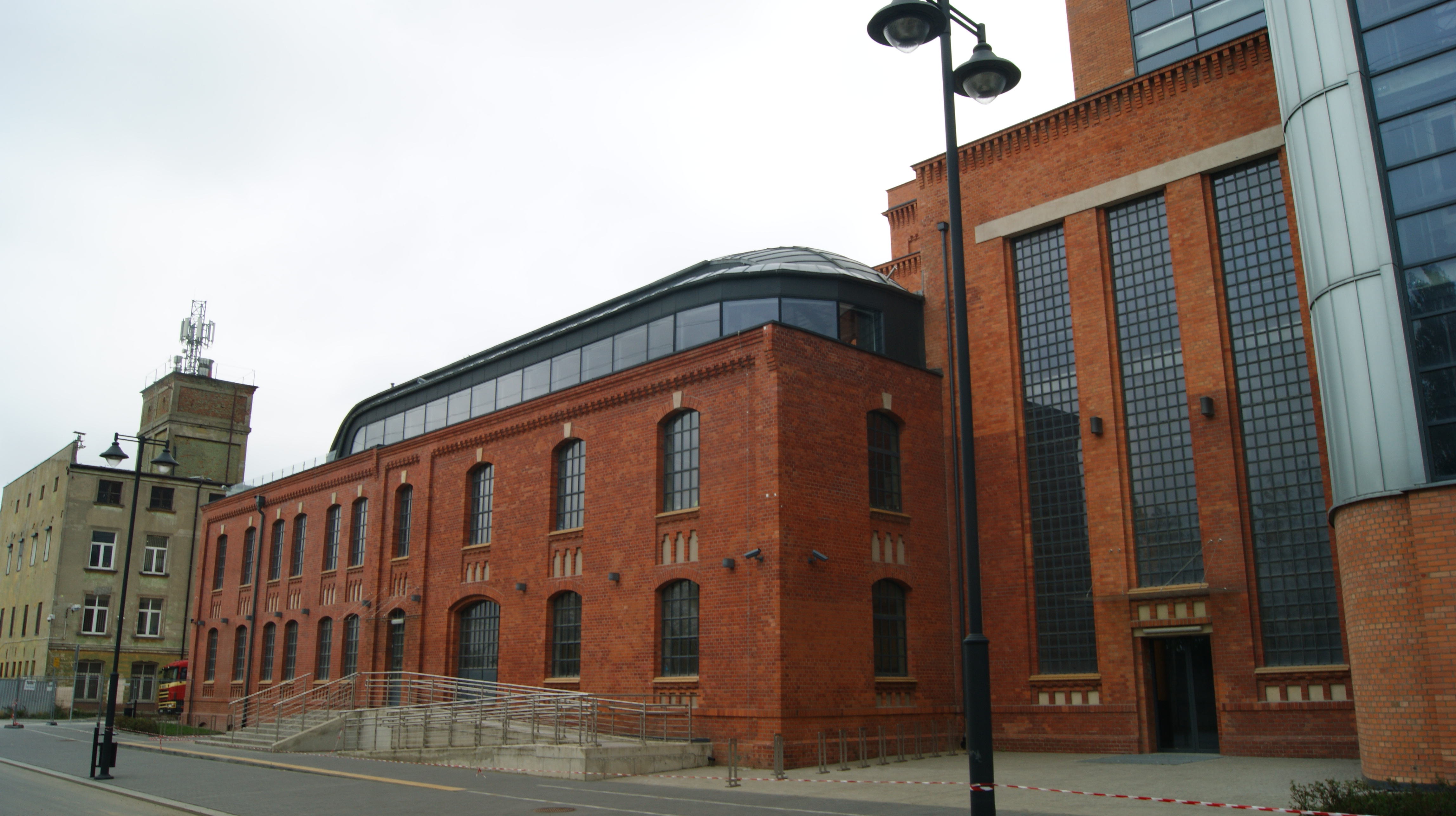 EC-1 to pierwsza łódzka elektrownia, uruchomiona w 1907 roku przy ul Targowej. Działała do 2005 roku. Obecnie zespół budynków dawnej EC-1 został poddany rewitalizacji, z celem przekształcenia go w Centrum Naukowo-Kulturalne